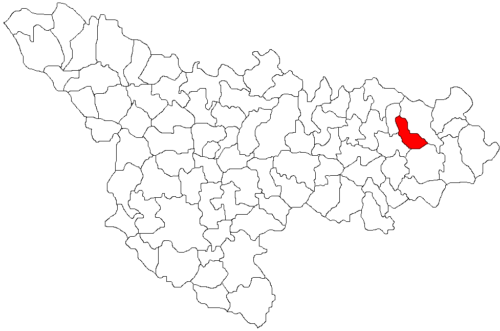 Dumbrava, Timis Licensing Categorie:Hărţi ale judeţului Timiş